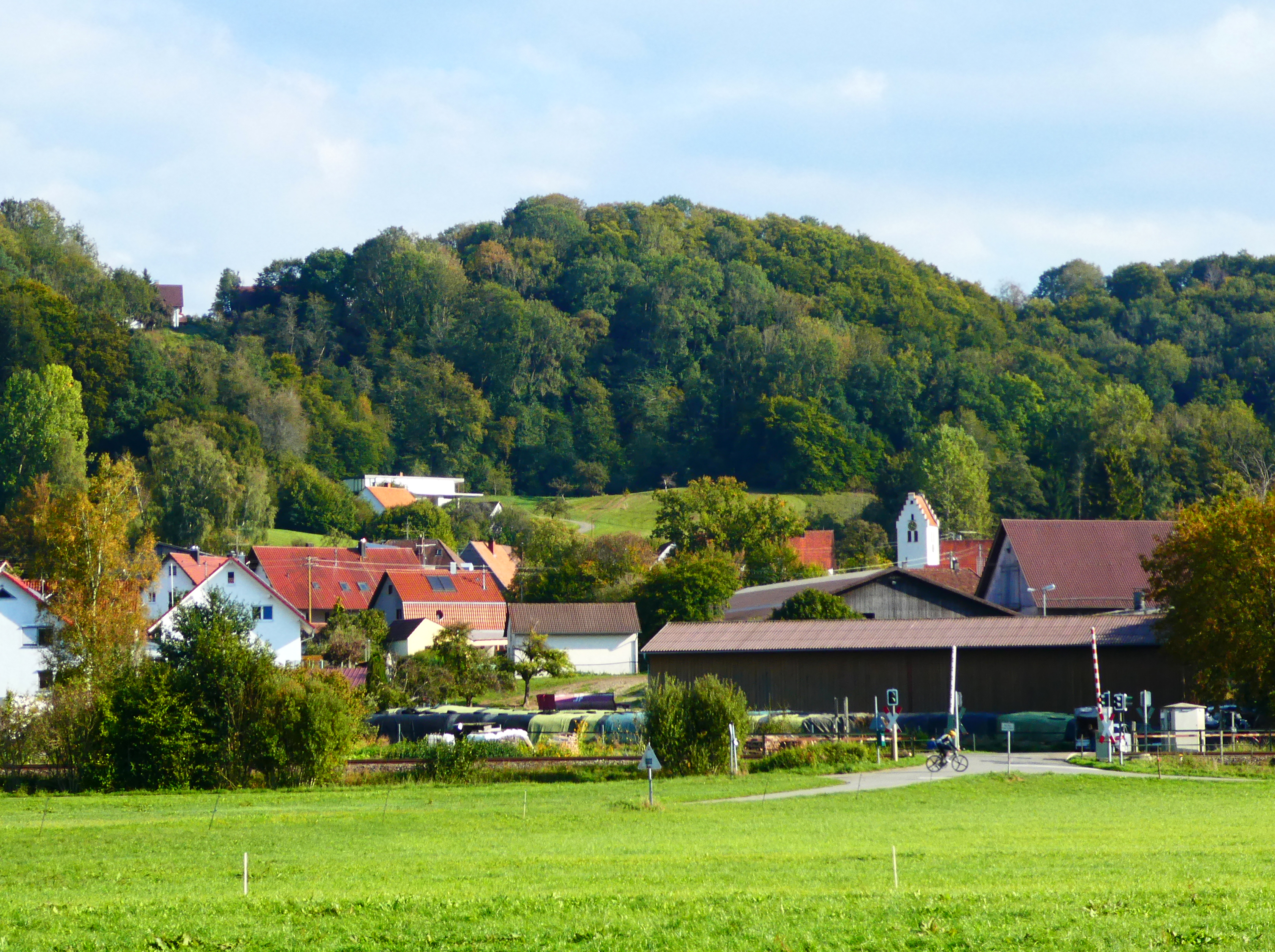 Burgberg im Osten von Schweinhausen (Ortsteil von Hochdorf (Riß)) bei Biberach, auf dem früher eine Burg stand